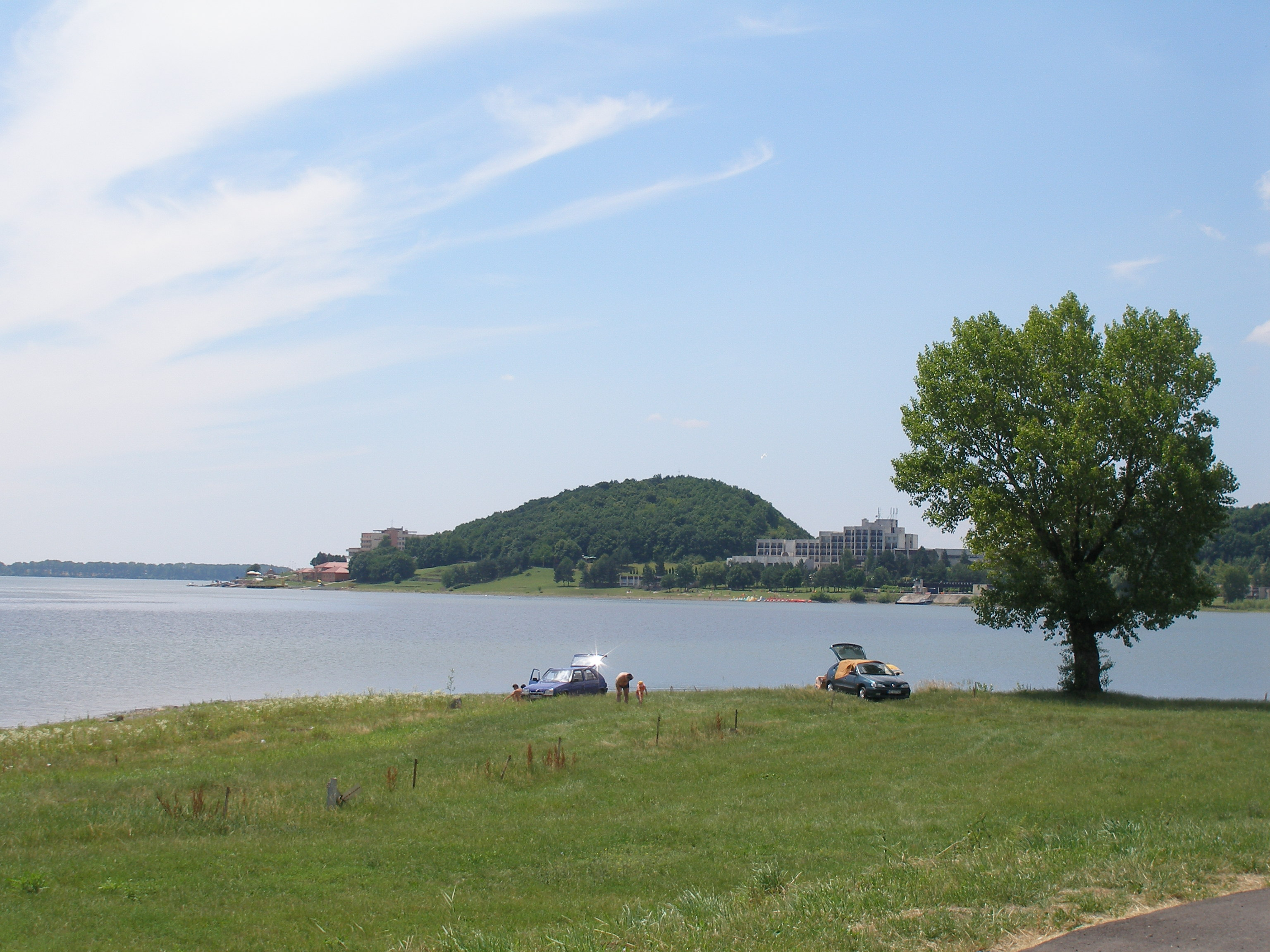 Vodná nádrž na Zemplíne, okr.Michalovce